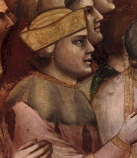 Giotto, possibile autoritratto